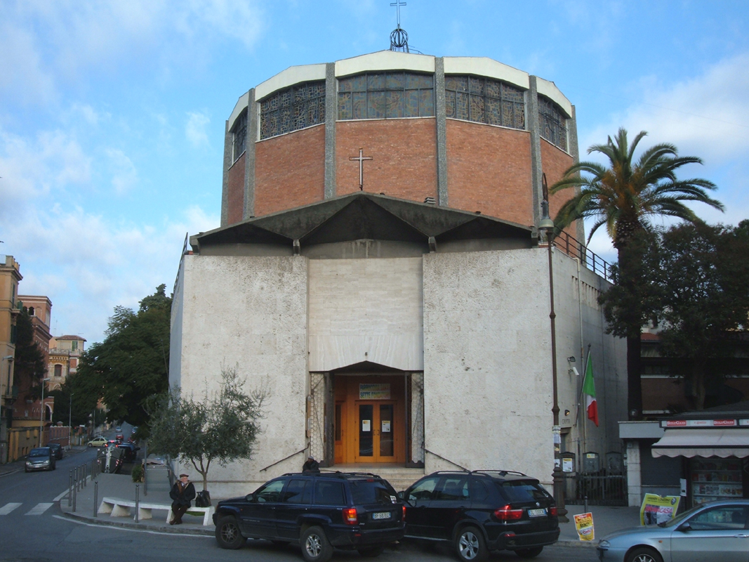 Chiesa dei Santi Sette Fondatori, a Roma, nel quartiere Nomentano.